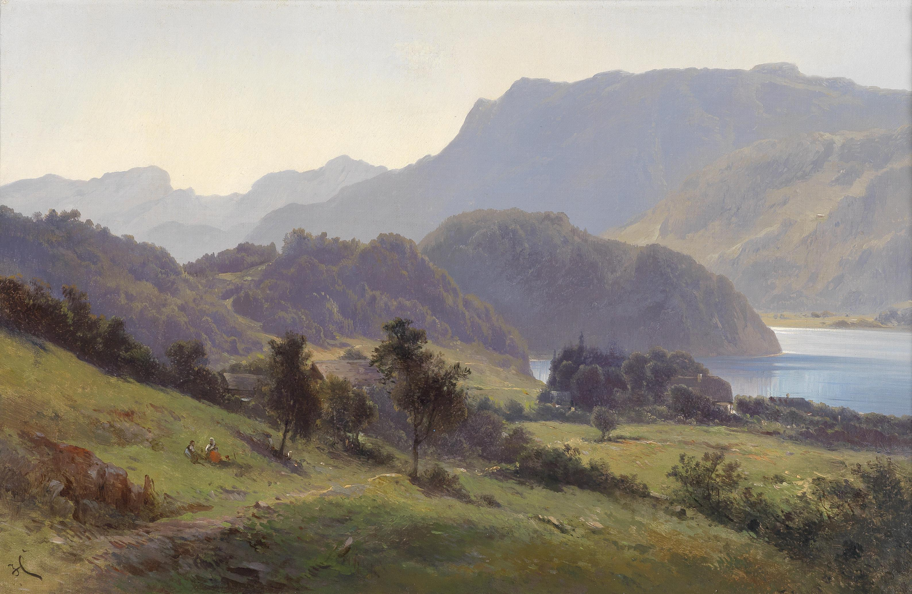 Partie am Wolfgangseelabel QS:Lde,"Partie am Wolfgangsee"